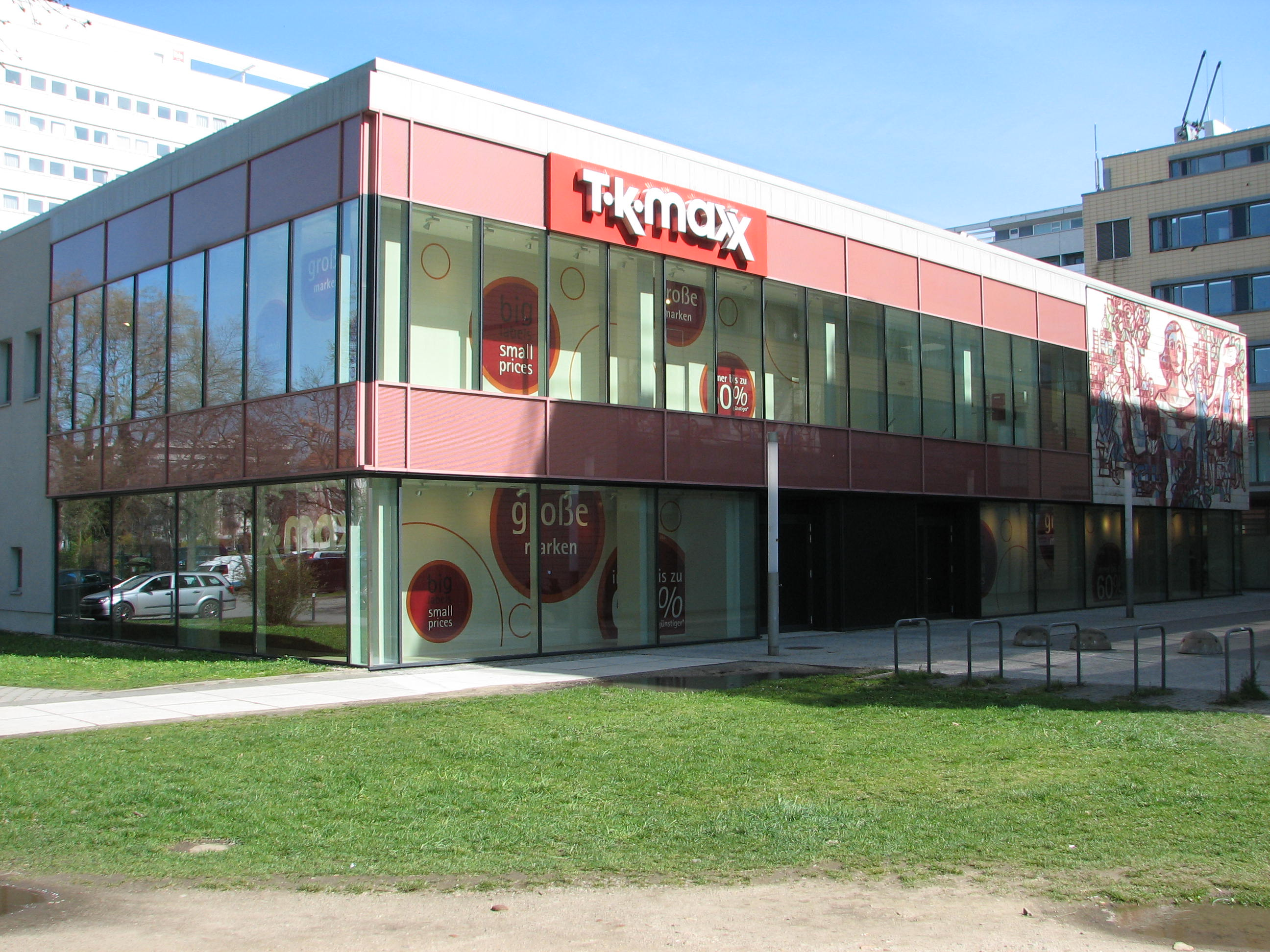 Ansicht des ehemaligen Restaurants "Bastei" am Wiener Platz, 2016 nach Umgestaltung 2005 Bekleidungsgeschäft